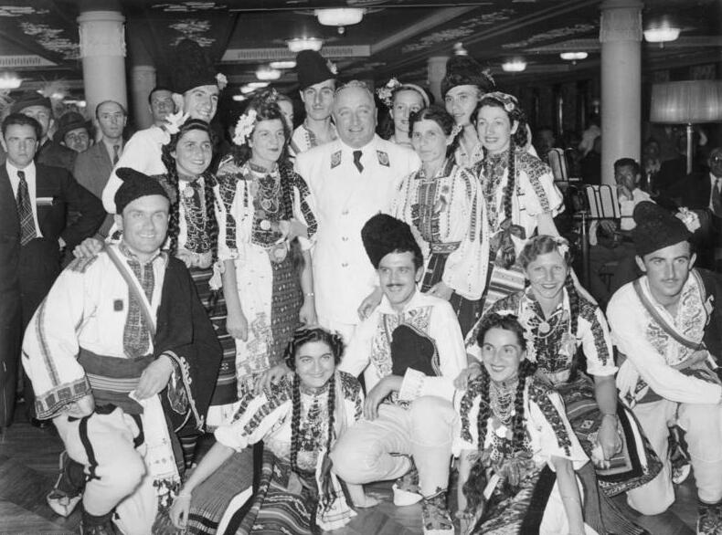 Scherl Bilderdienst: Internationale KdF-Tagung in Hamburg Empfang der ausländischen Gäste auf dem KdF-Schiff "Robert Ley". U.B.z.: Dr. Ley umgeben von Bulgaren Fot. Eis[enhardt] 20.7.1939